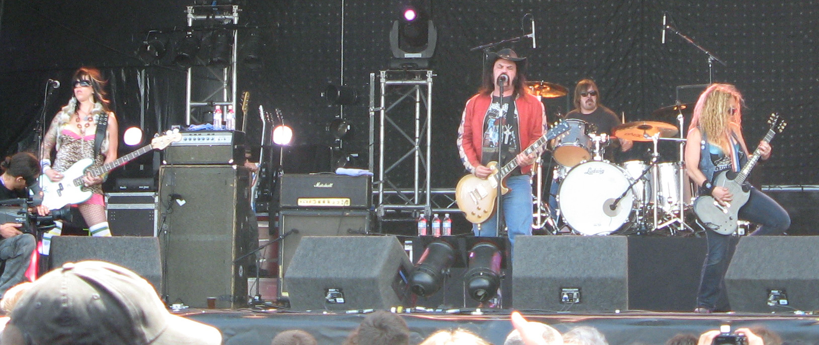 Nashville Pussy performing at Hellfest 2009